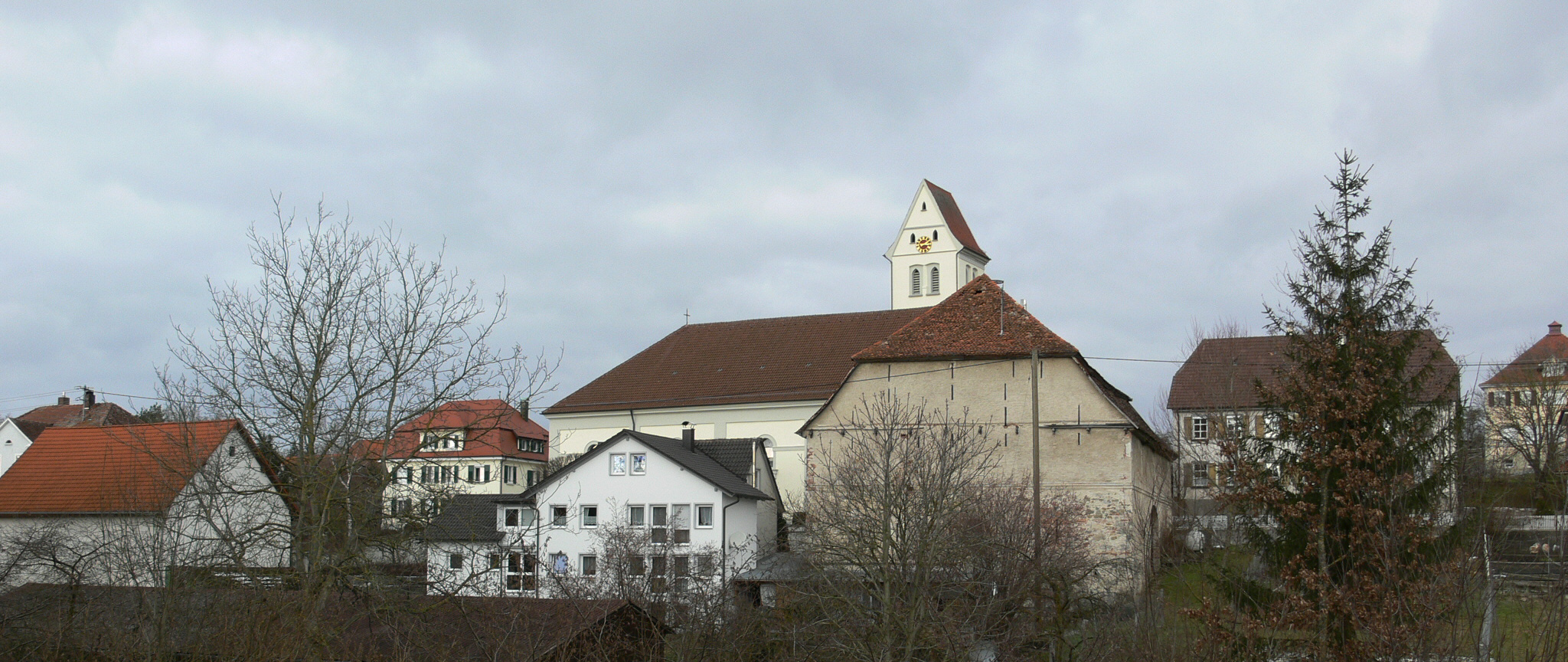 Ebenweiler, Kreis Ravensburg